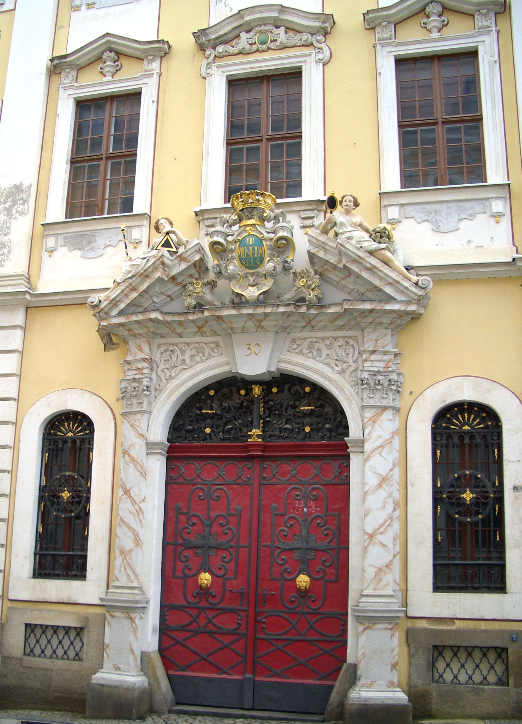 Görlitz, Neißstraße 30. Sitz der 1779 gegründeten Oberlausitzischen Gesellschaft der Wissenschaften.